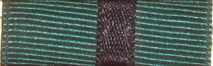 Medalla Naval ContraAlmirante Armando Lopez Conde infanteria de marina de Venezuela ribbon bar